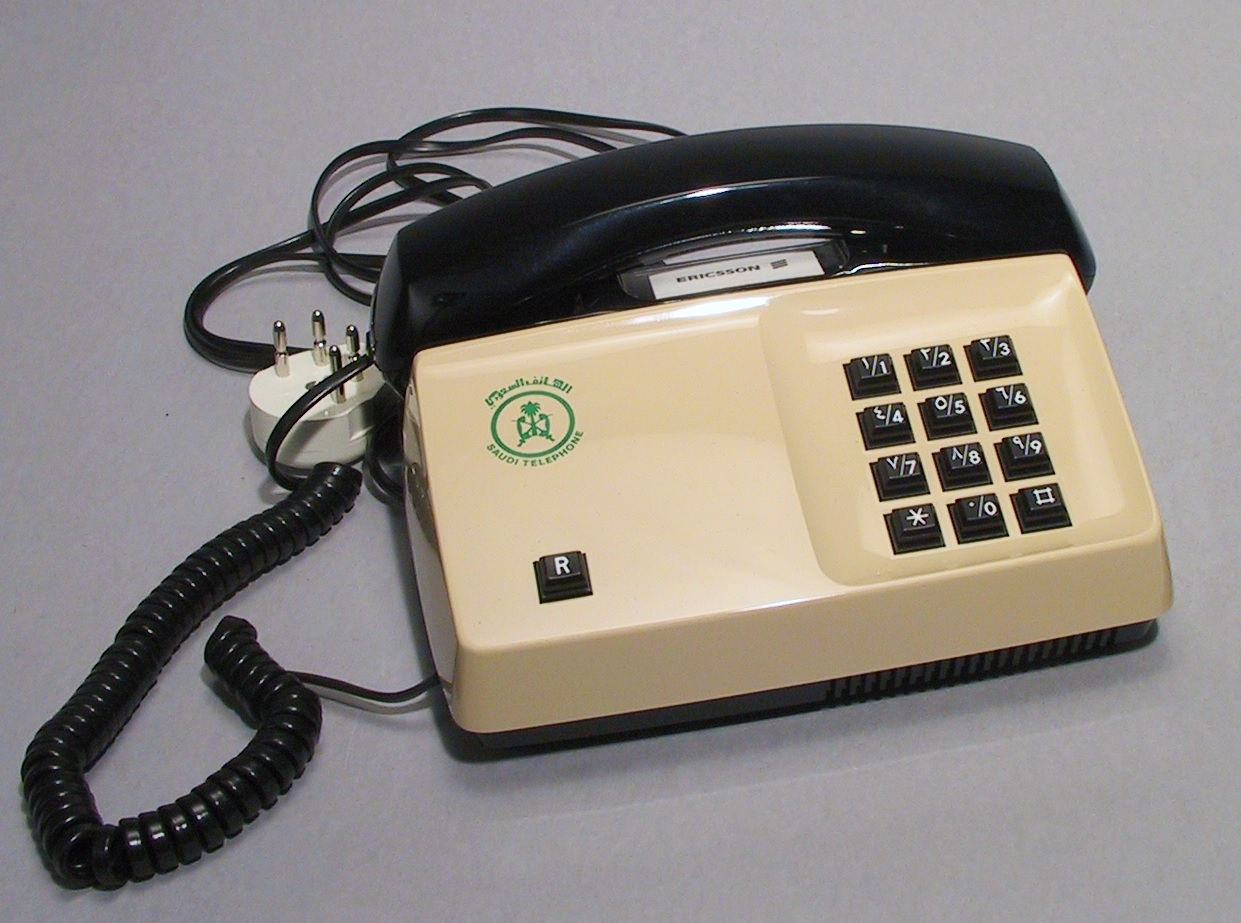 Telefonapparat Ericsson Diavox exportmodell för Saudiarabien, märkt "Saudi Telephone", med speciell märkning på knappsatsen. För AT-system, huvudapparat, anknytningsapparat till abonnentväxel och sidoapparat. Bordsmodell av plast med beige kåpa, svart mikrotelefon, knappsats med tolv knappar för tonval, R-knapp för aktivering av tilläggstjänster under pågående samtal, apparatsnöre med proppanslutning, högohmig reglerbar ringklocka, elektretmikrofon och elektronisk talkrets med automatisk dämpningskompensering.